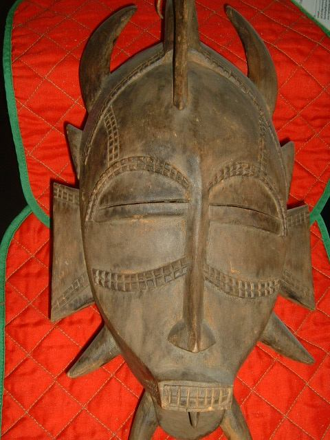 GNU-FDL, selbst fotografiert, Maske in eigenem Besitz.Bild:Maske von der Elfenbeinküste Lizenz